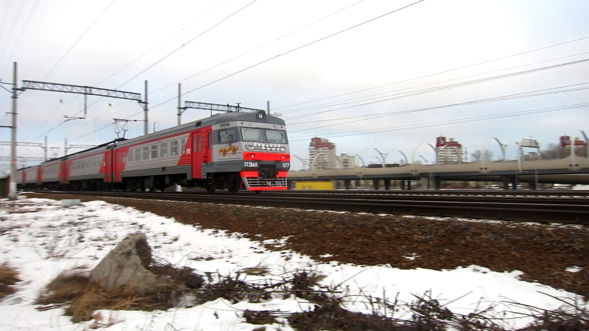 Электропоезд ЭТ2МЛ-077 "Лужский Рубеж" у платформы Ленинский Проспект.